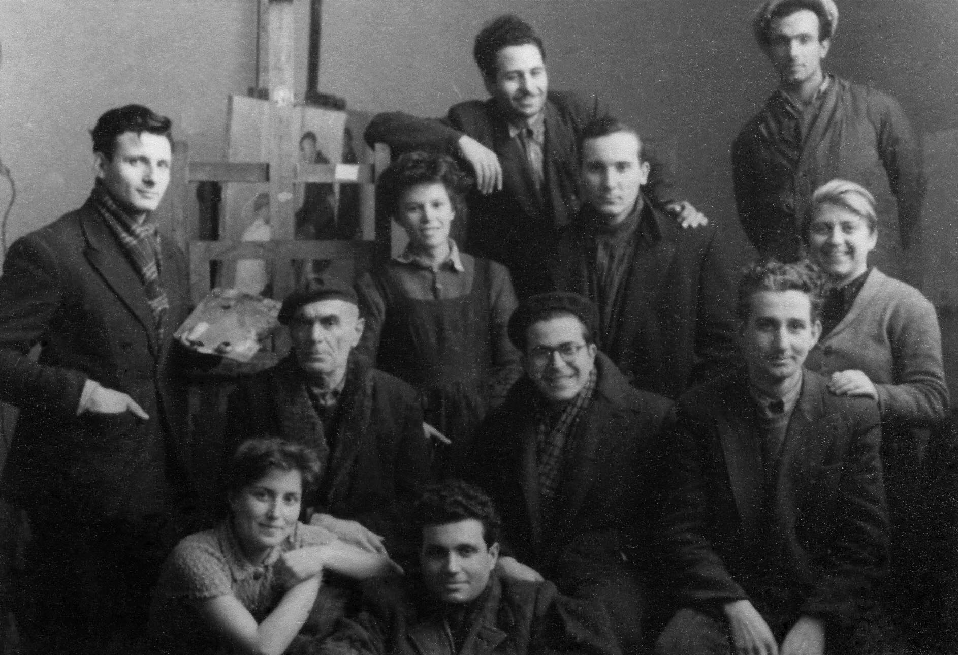 Моделът бай Георги и студенти от Художествената академия - ок. 1952-53 г. Students of The National Academy of Arts - Sofia, 1952-53